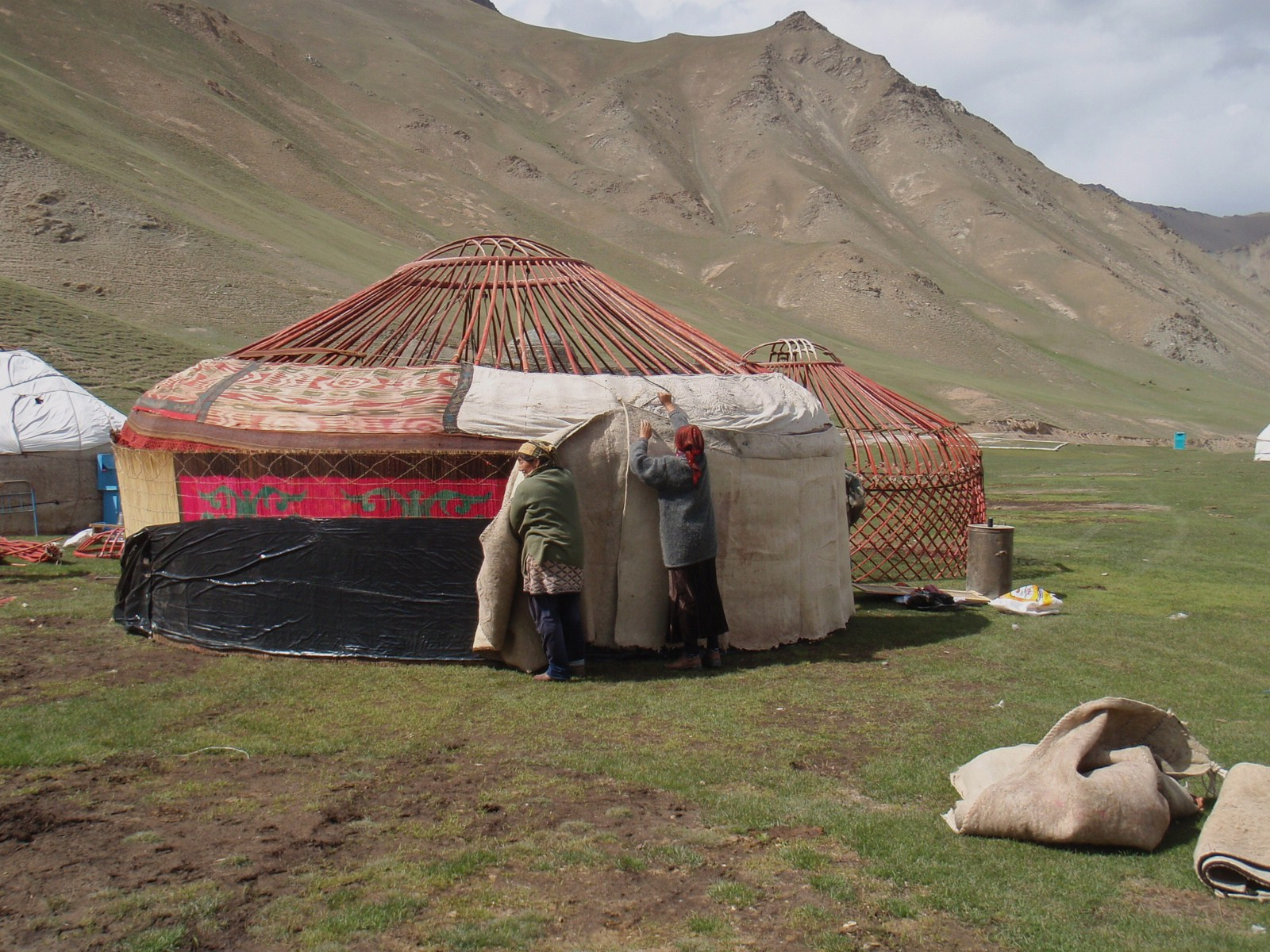 ユルトを布で覆うキルギスの女性。中国との国境に近いナルイン州南部にて。2010年5月中旬撮影。